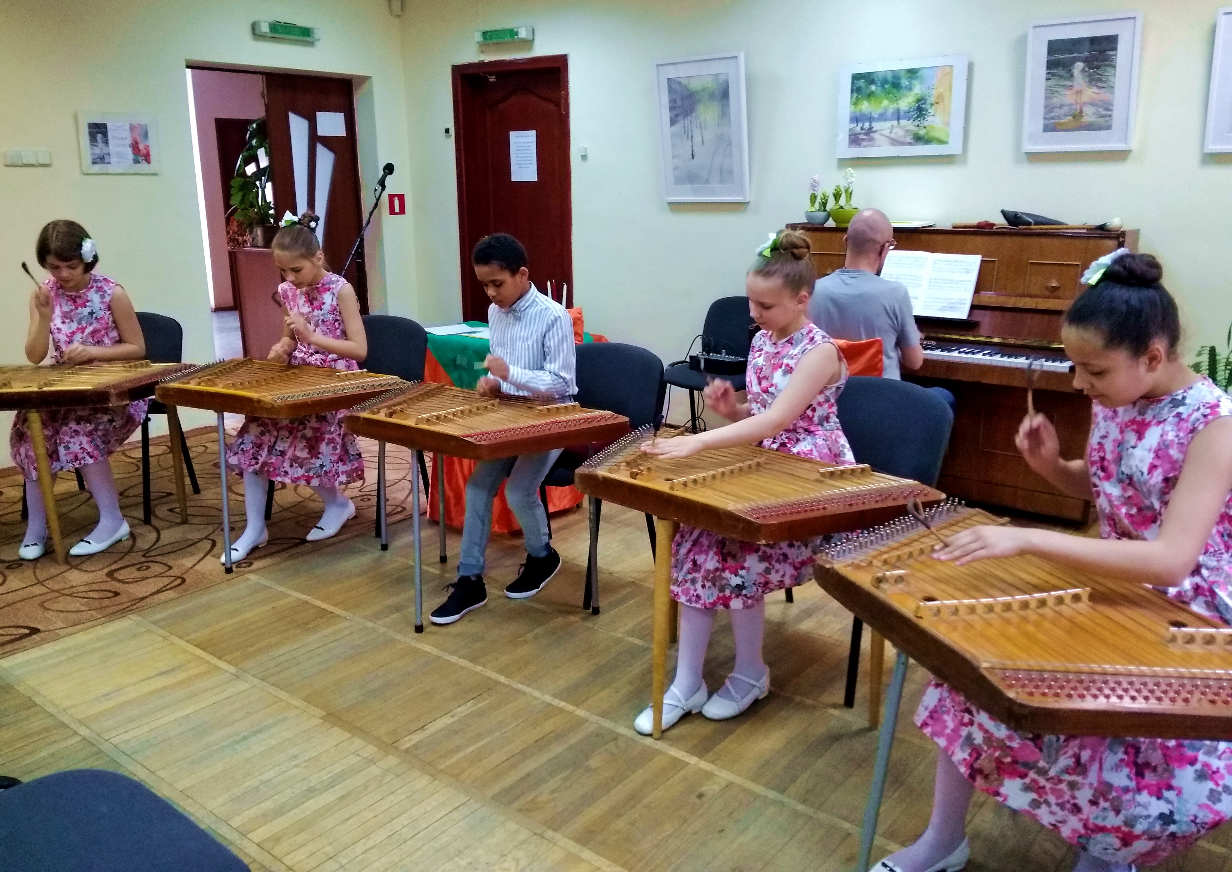 Ансамбль цымбалістаў «Музыкі» пры мінскай музычнай школы № 10 ім. Я. Глебава. Мінск, бібліятэка ім. Цёткі